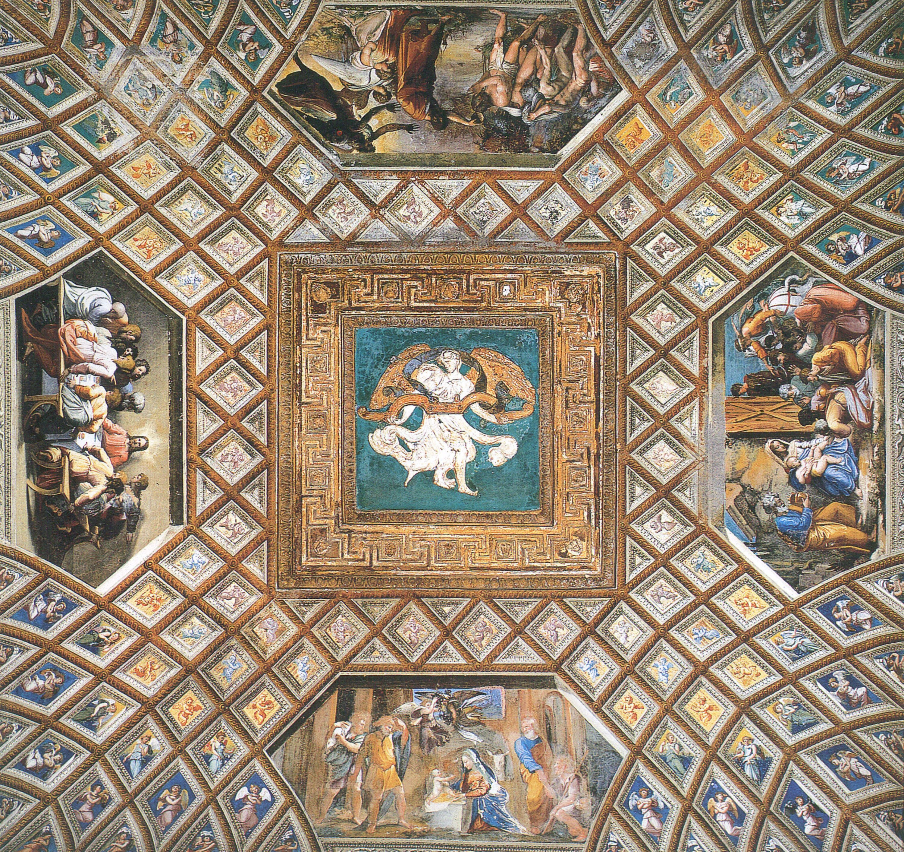 Città del Vaticano, Loggia di Raffaello: Tredicesima volta – storie di Cristo